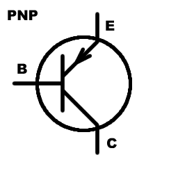 Schematisk Symbol för en PNP transistor B = Bas C = Kollektor (eng. Collector) E = Emitter Gjord av: Daniel Ryde, Skövde 2004-08-27 Licens: GFDL